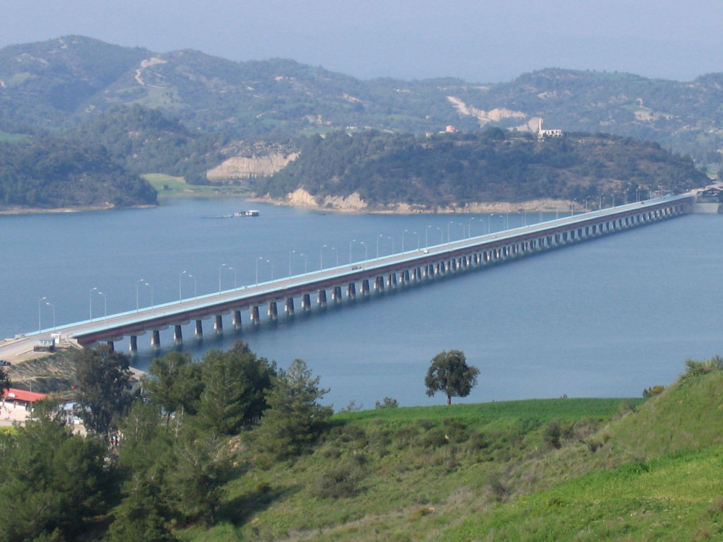 Adana Seyhan Barajı